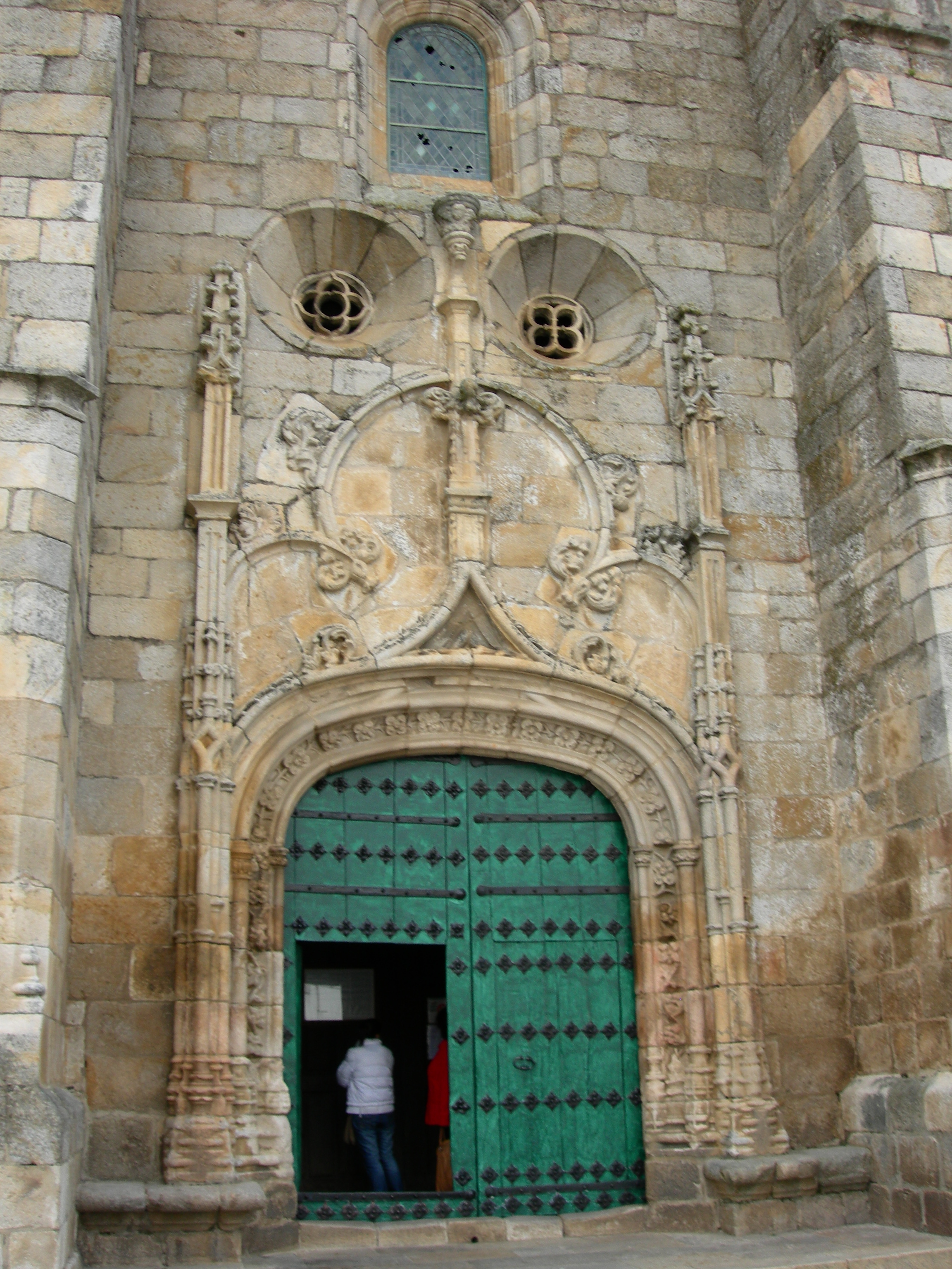 Fachada de la Igreja de São Miguel (S: XVI) This monument is classified as Monumento Nacional. This file was uploaded for Wiki Loves Monuments in Portugal with the unique identifier 70360.